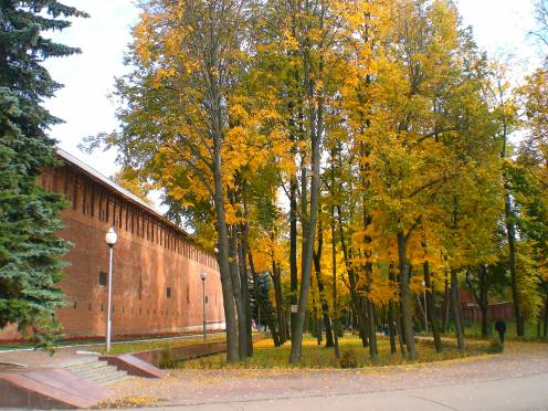 Смоленск сквер памяти героев